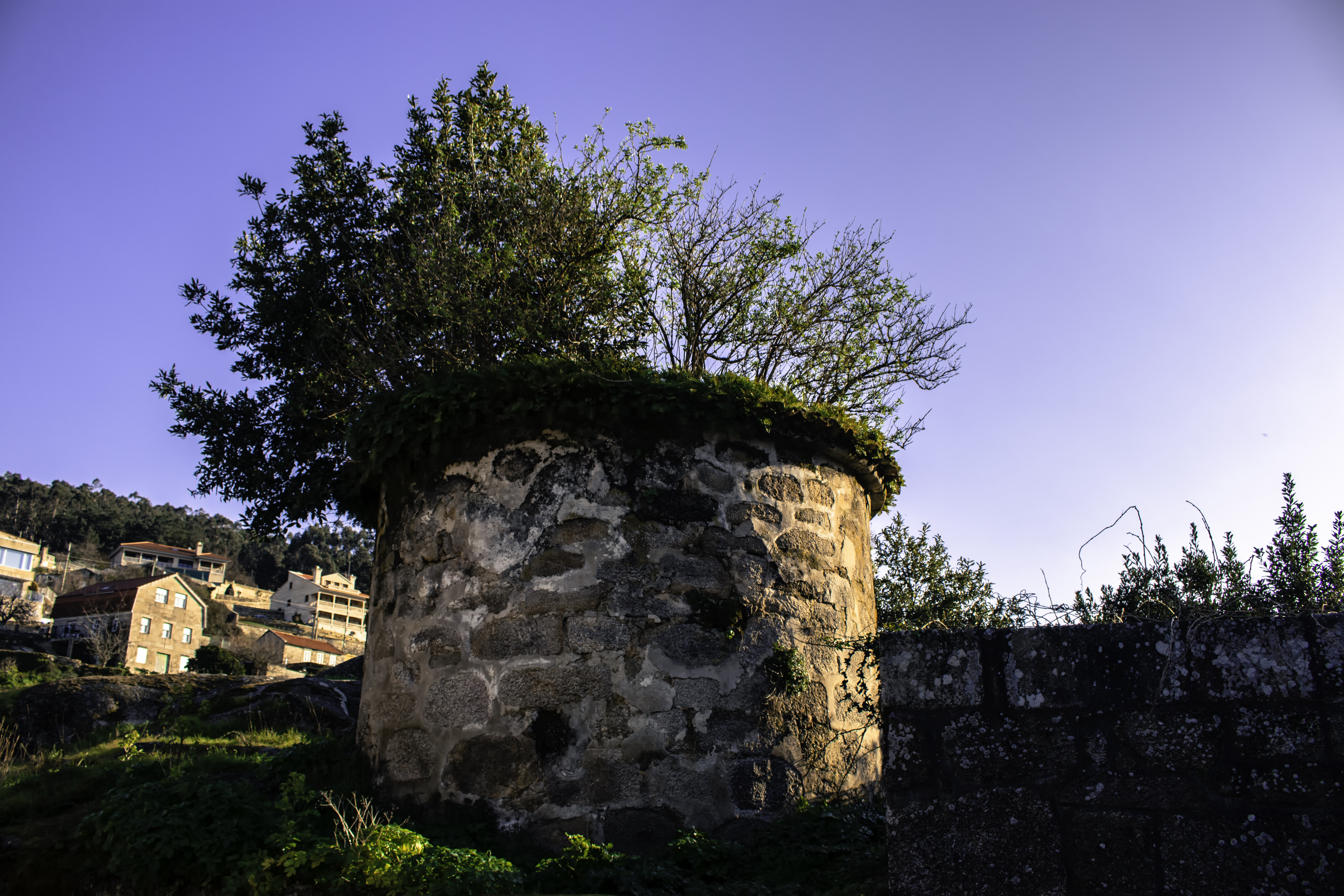 Pombal en San Cibrán, Aldán.